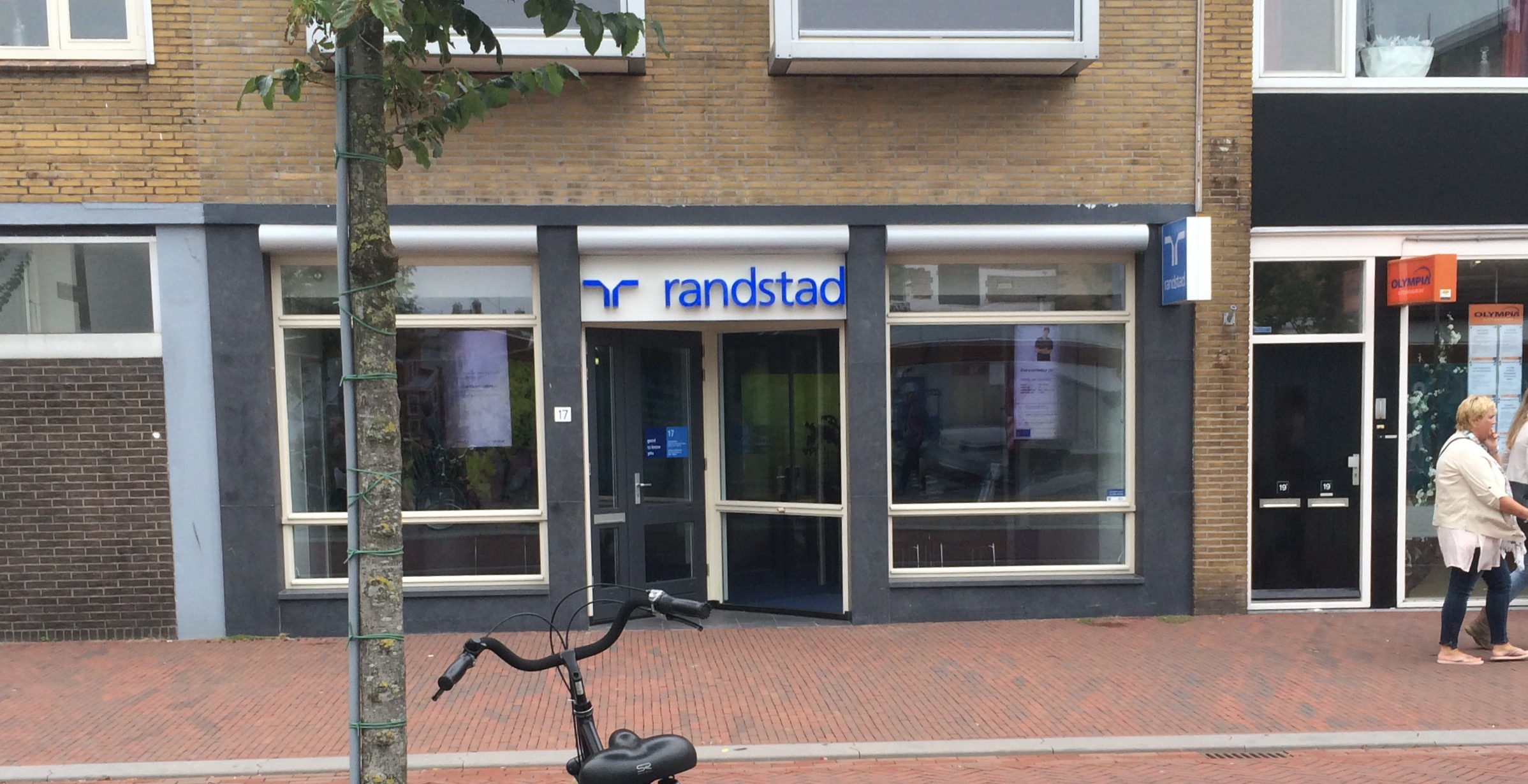 Randstad Shop